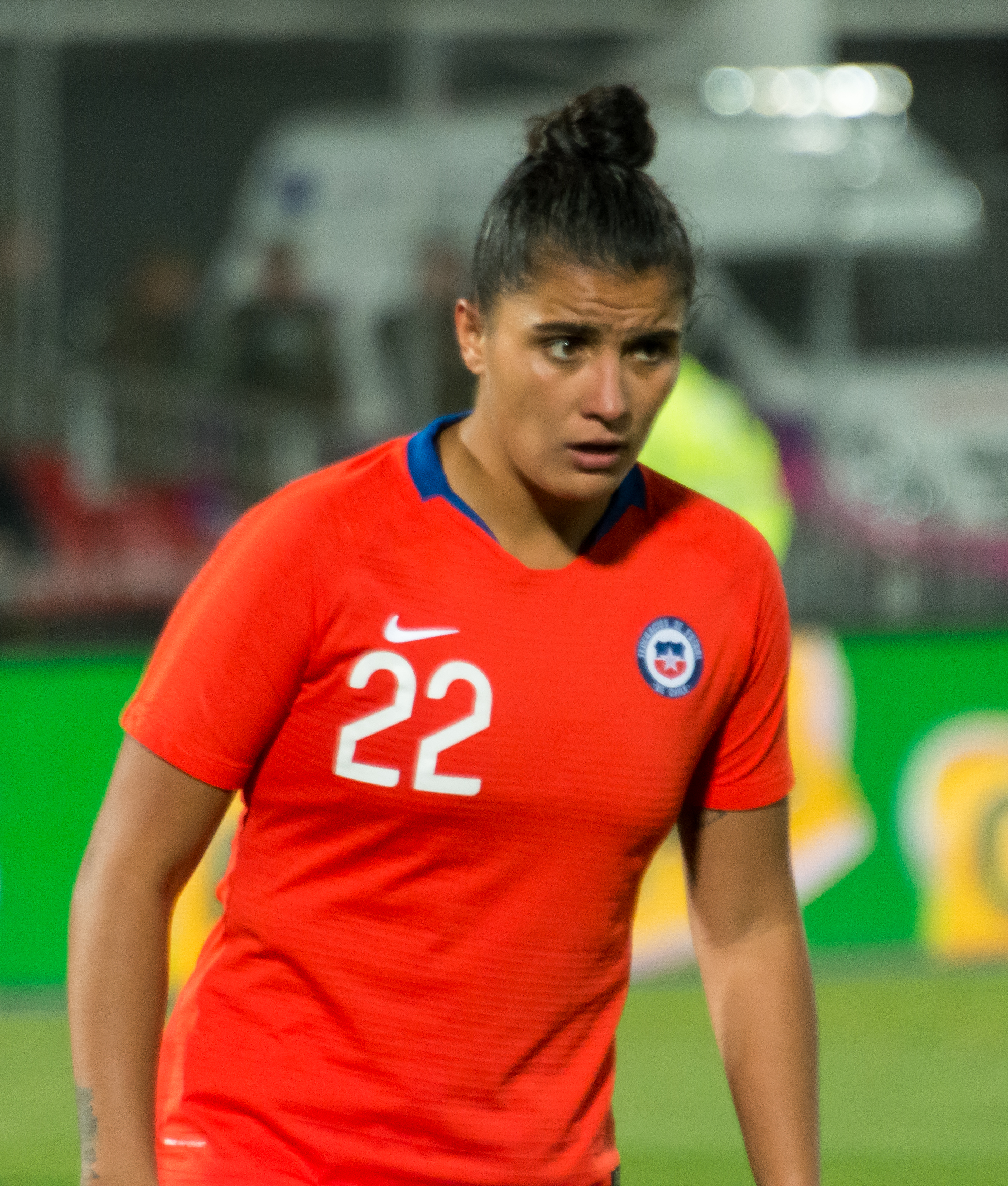 María José Urrutia, Chile v Colombia, Estadio Nacional, Ñuñoa, Santiago, Chile.